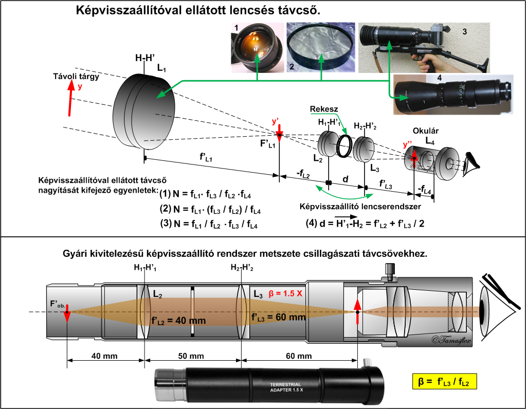 Terresztikus adapter csillagászati tavcsövekhez